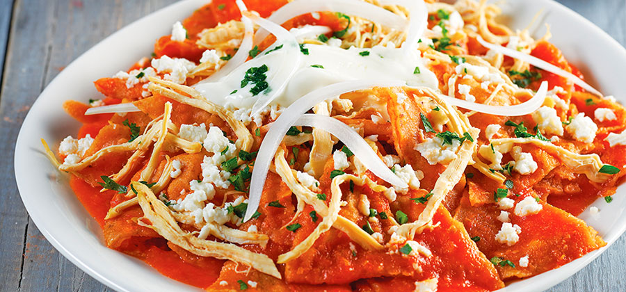 Chilaquiles Rojos